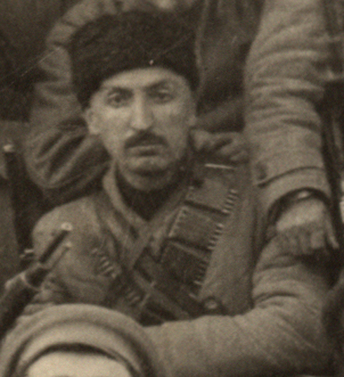 ვ. ჯუღელი. სახალხო გვარდიის მეთაური, 1918 წ.